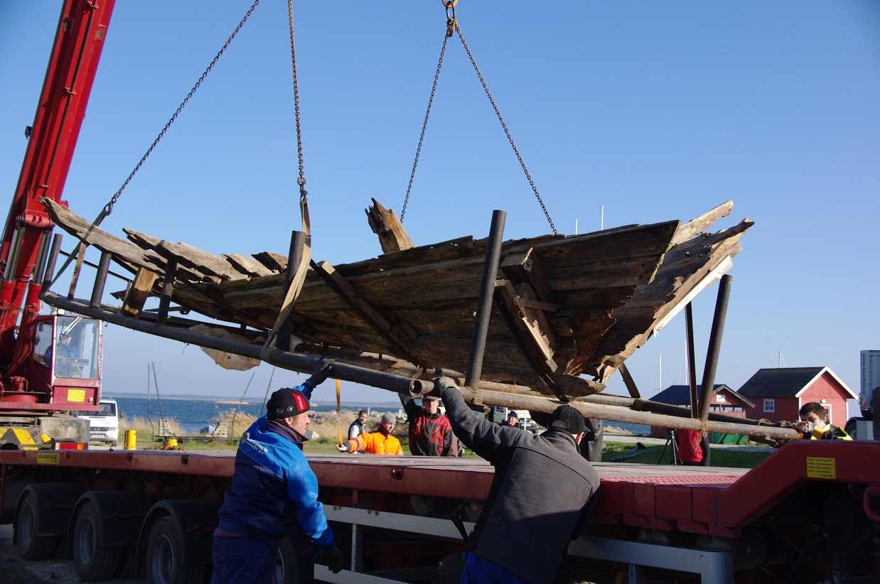 Maasilinna laevavrakk, avastatud 1985.aastal.